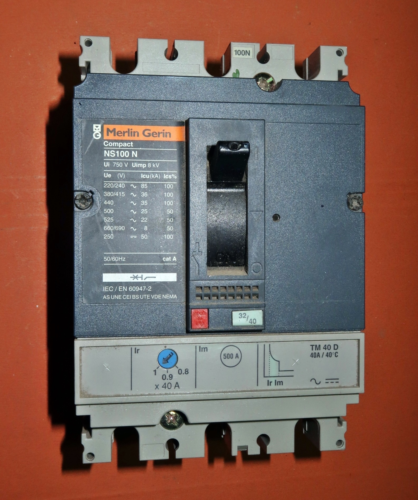 MCCB Merlin Gerin compact NS100N (front side) , Molded case circuit breaker, เซอร์กิตเบรกเกอร์ ,โมลเคสเซอร์กิตเบรกเกอร์